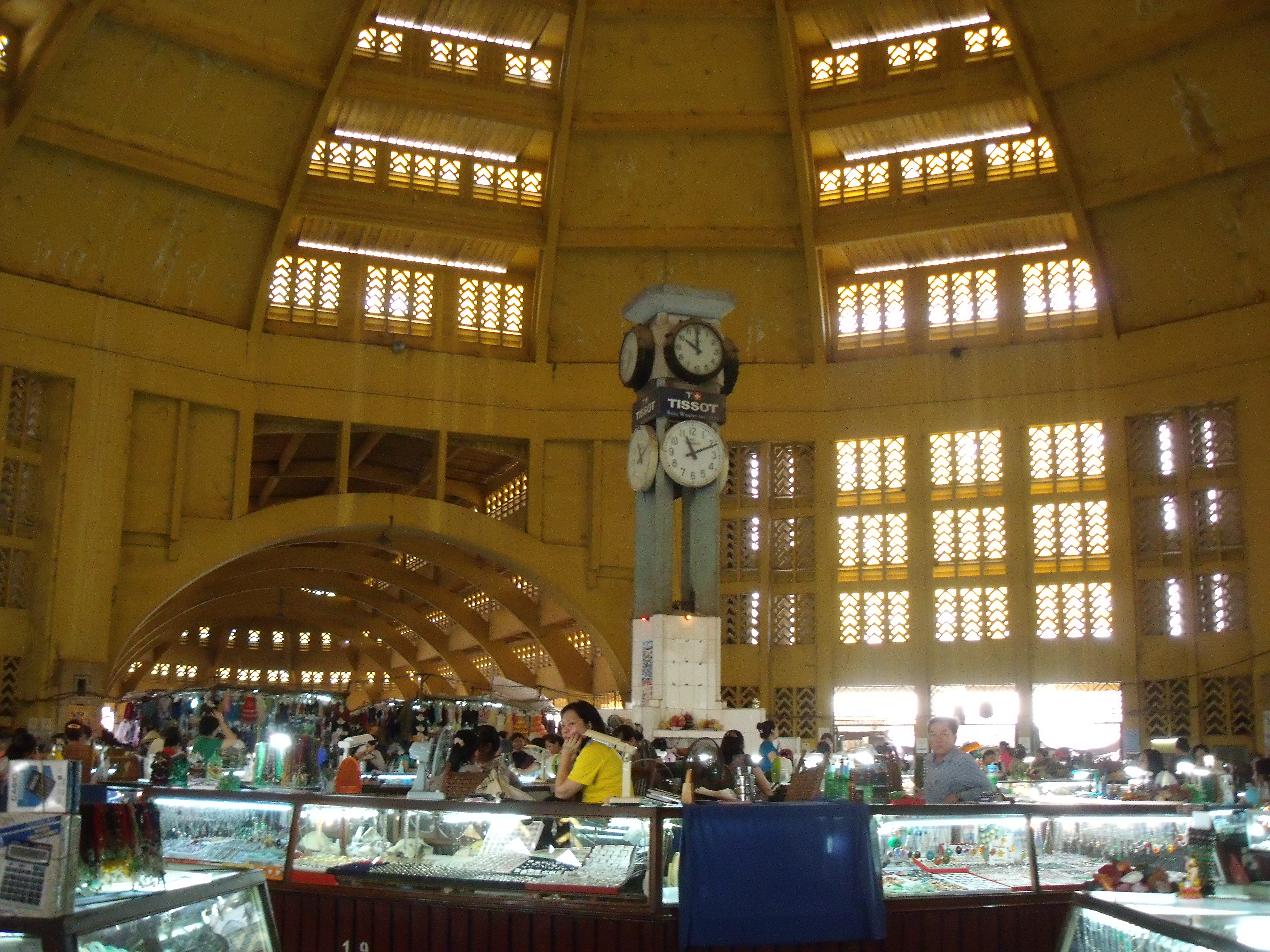 Centre du Marché Central de Phnom Penh (sous le dôme).